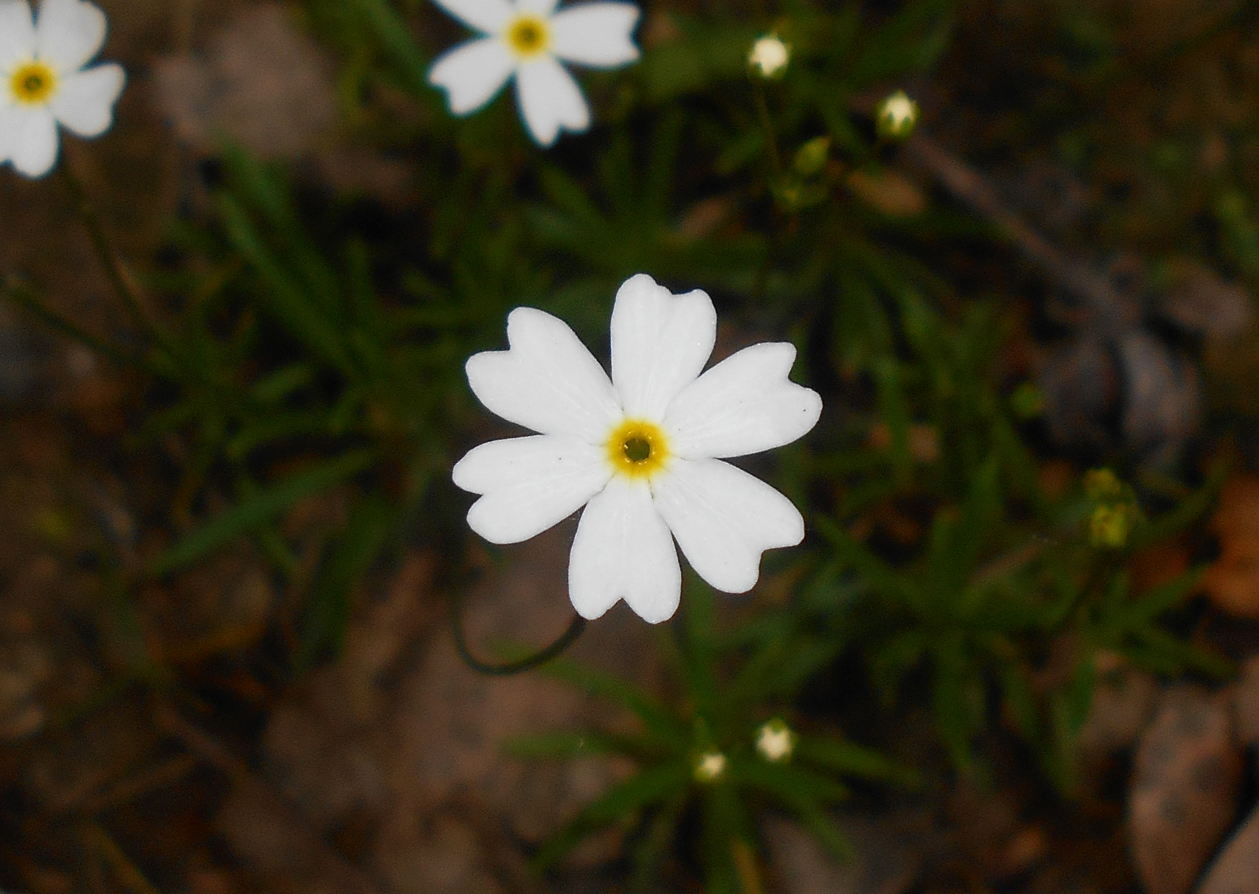 Naradka mlecznobiała (Androsace lactea), Ogród Botaniczny UMCS w Lublinie